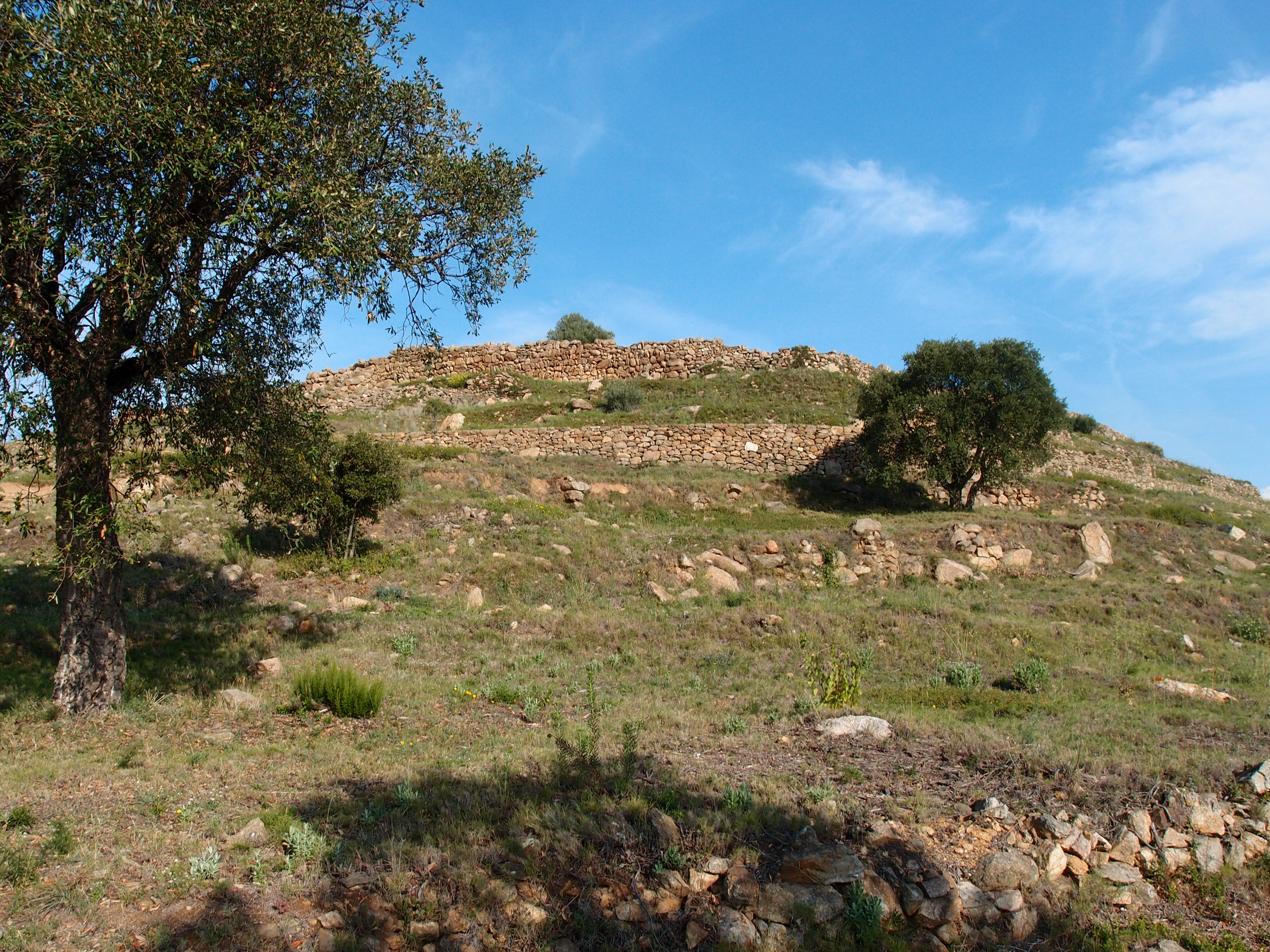 Castrum visigotic Roses (westgotisches Kastelle in Roses) Datum: 16.09.2014 Urheber: M. Pfeiffer alias Gordito1869 Quelle: privates Fotoarchiv des Urhebers